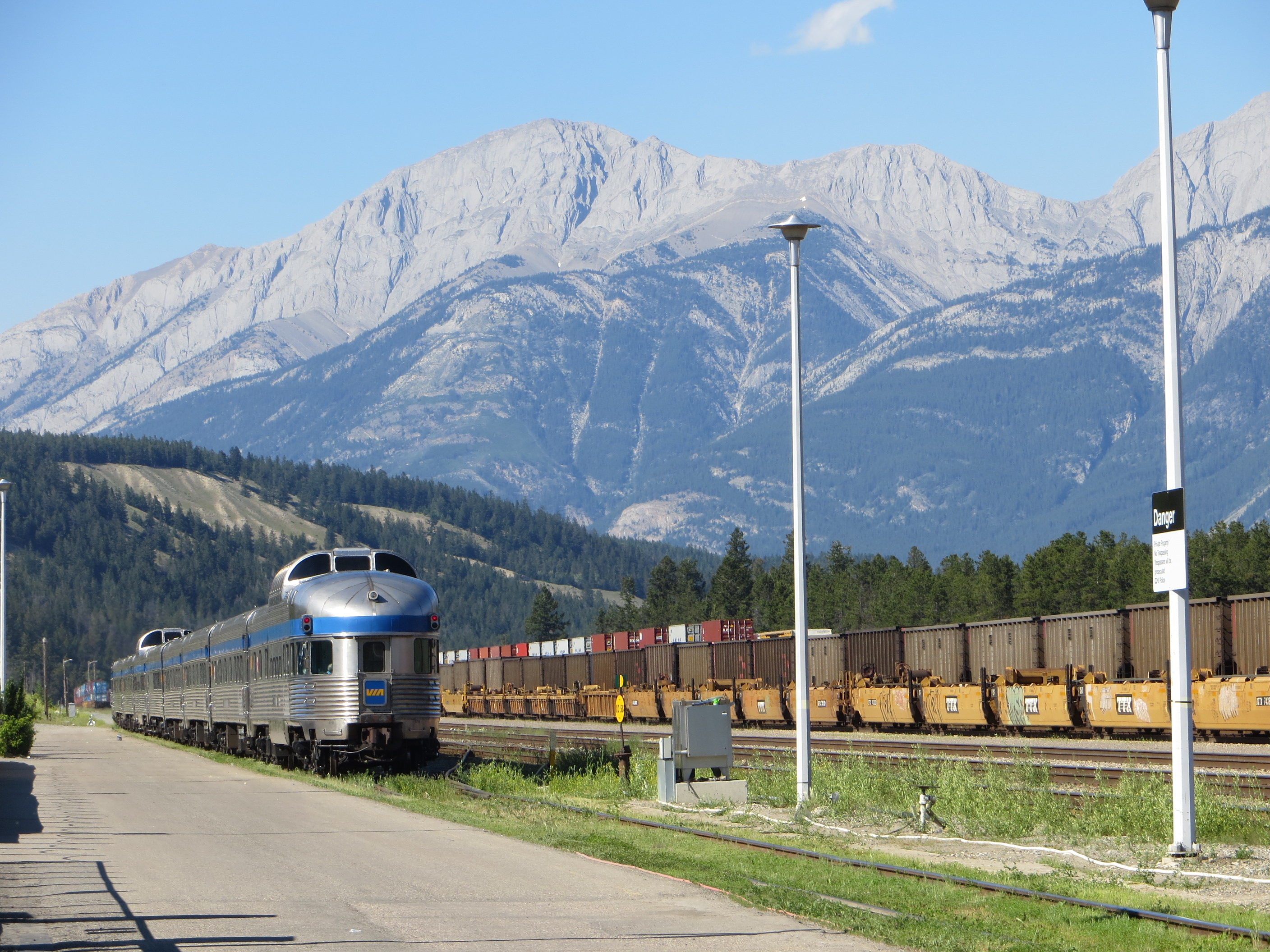 20130701 56 VIA, Jasper, Alberta